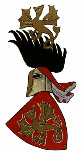 A Hermán-nemzetség címere, oklevelek és pecsétek alapján megrajzolta: Csoma József 1900-ban